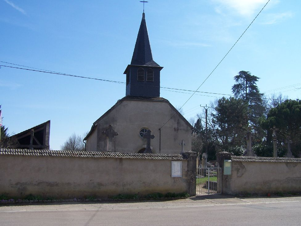 église de TAILLY 21